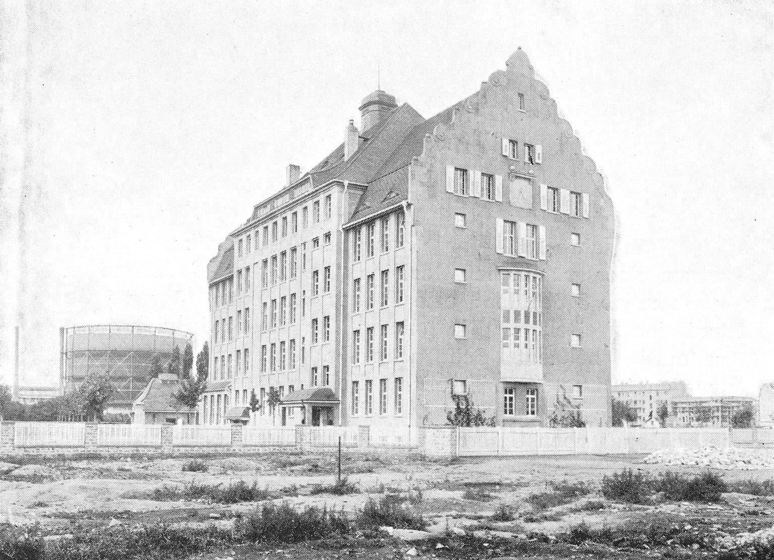 Bernardschule in Offenbach am Main 1911